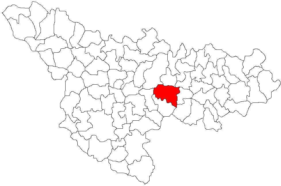 Categorie:Hărţi ale judeţului Timiş